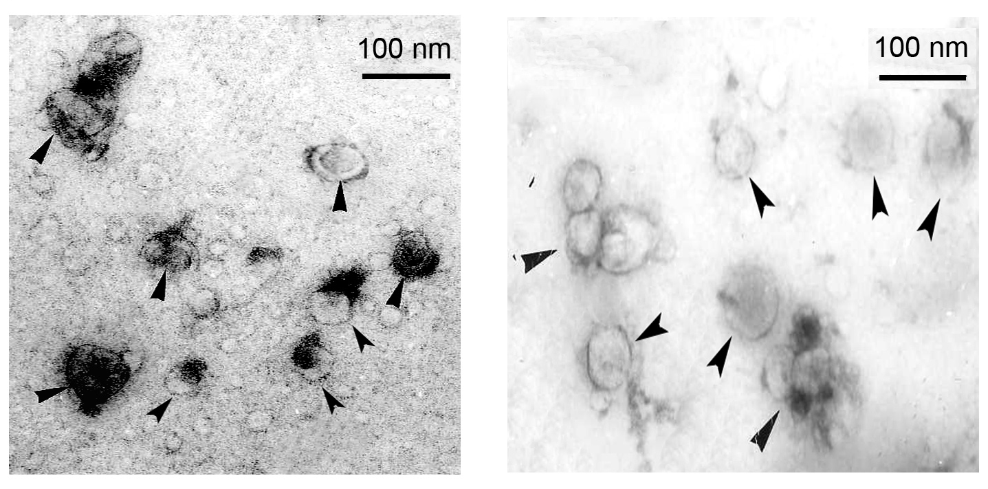 Figura 1. Características morfológicas de las vesículas extracelulares EV tímicas humanas. (A) vesículas extracelulares (EV) de cultivos tímicos humanos visualizados con microscopía electrónica. Las puntas de flecha apuntan hacia las vesículas extracelulares (EV) con una morfología en forma de copa exosomal típica y un rango de tamaño de 50 a 100 nm. Barra de escala 100 nm. Microscopía electrónica de transmisión.